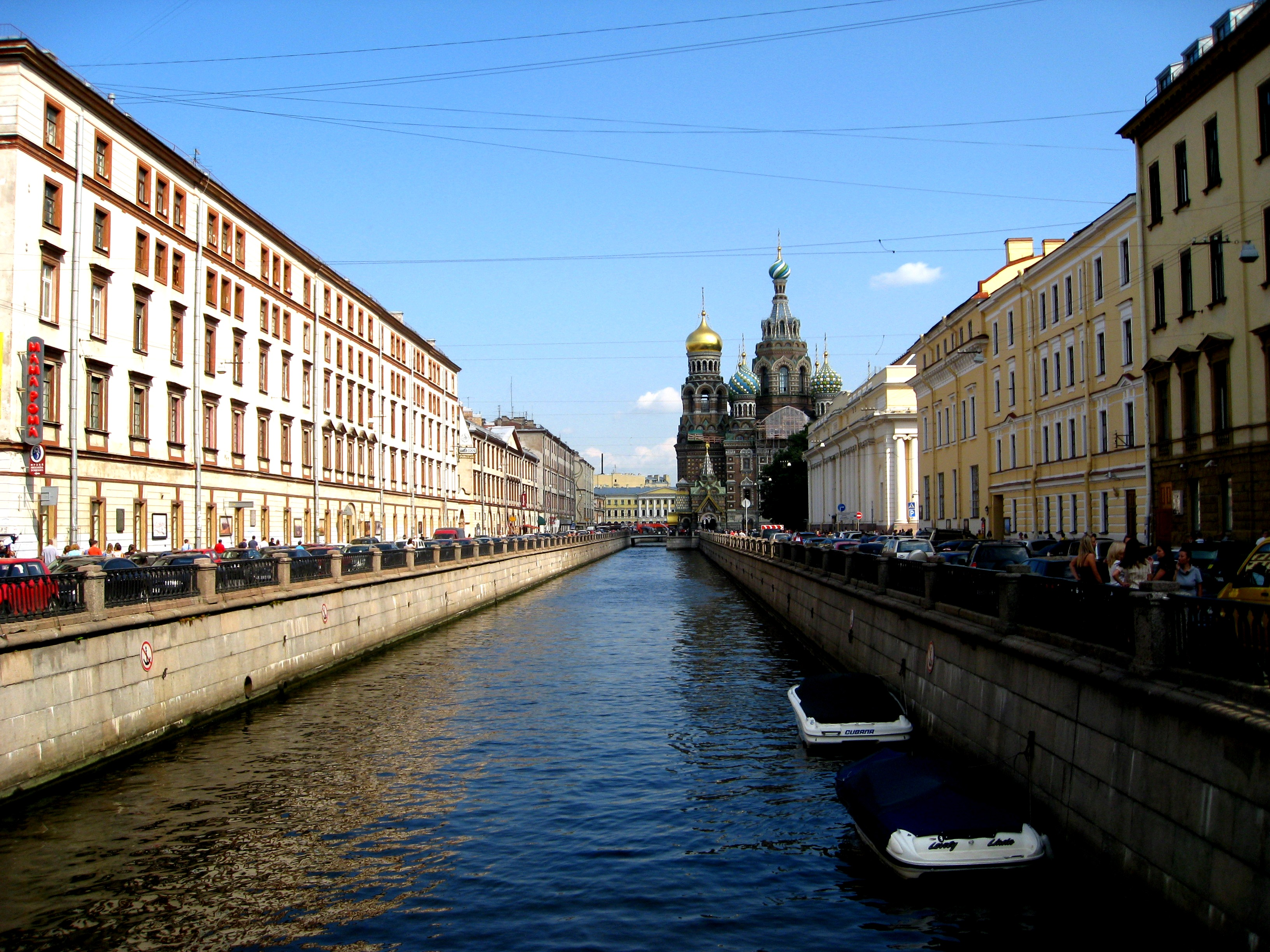 Набережная канала Грибоедова